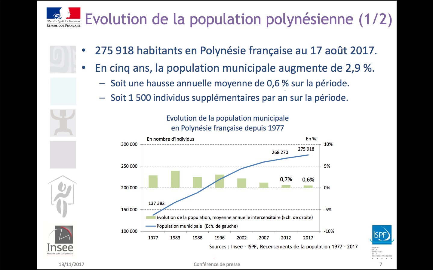 évolution de la population polynésienne.